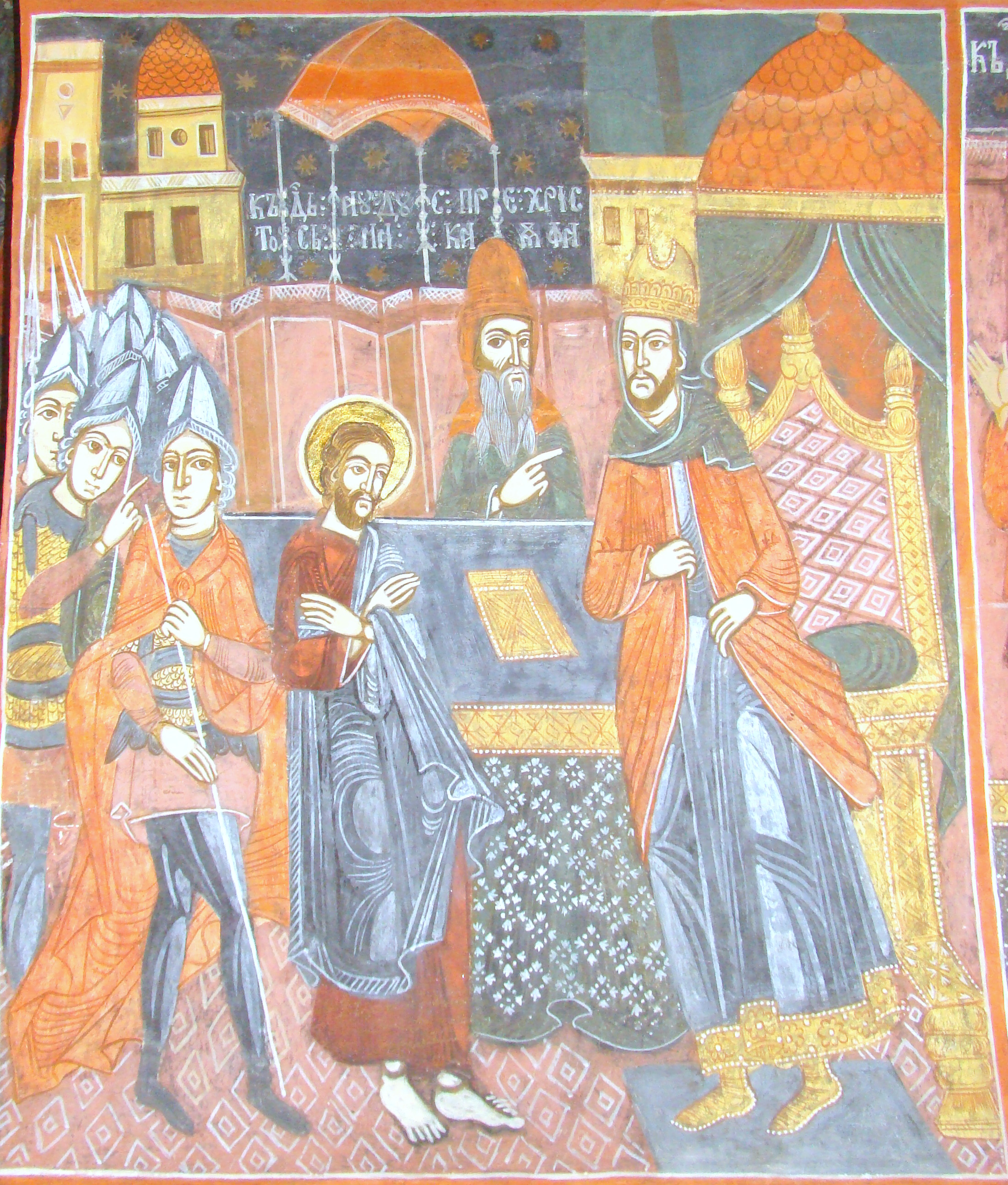 Biserica "Sf. Nicolae" din Mohu, județul Sibiu